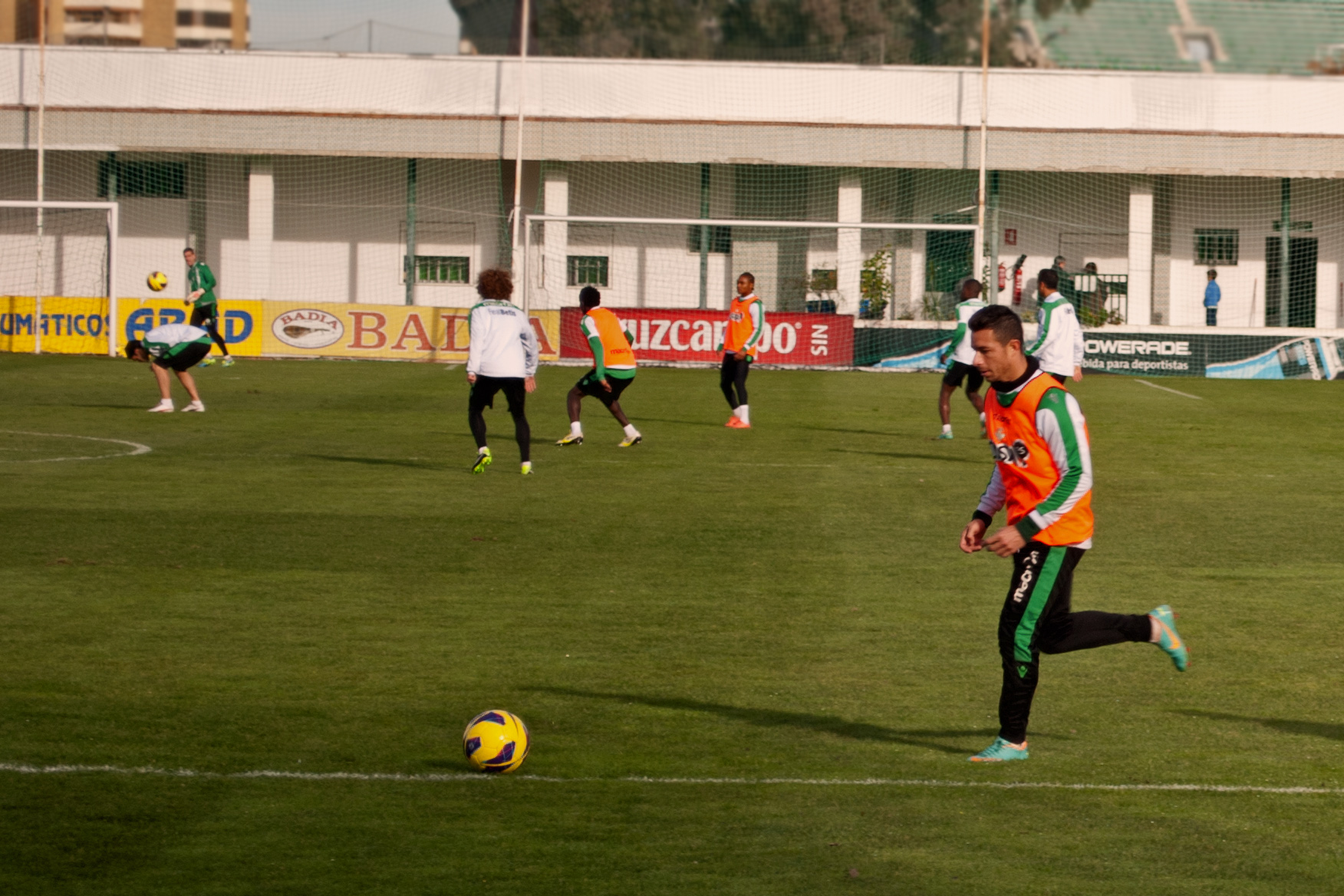 Ruben Castro, futbolista español, durante un entrenamiento en la Ciudad deportiva del Real Betis.